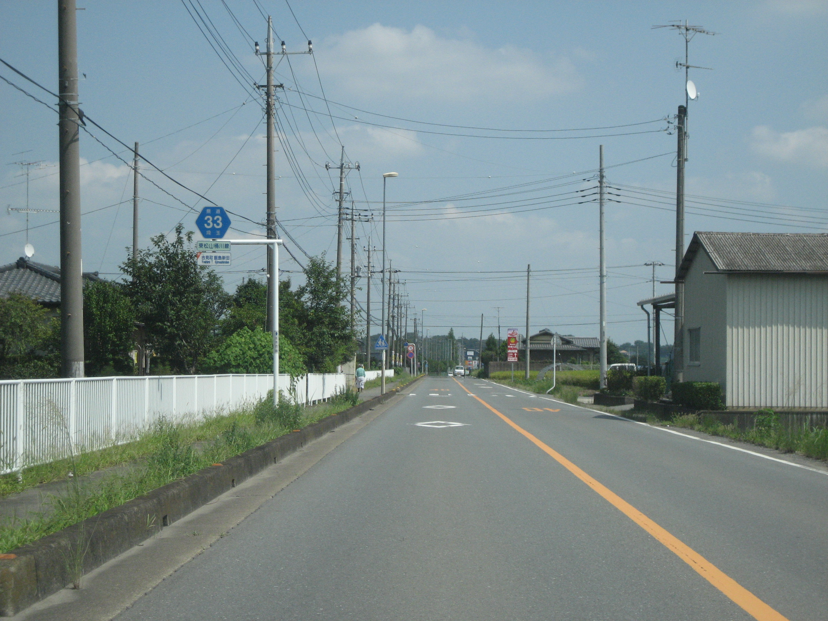 埼玉県道33号線吉見町飯島新田（北本方面を撮影）